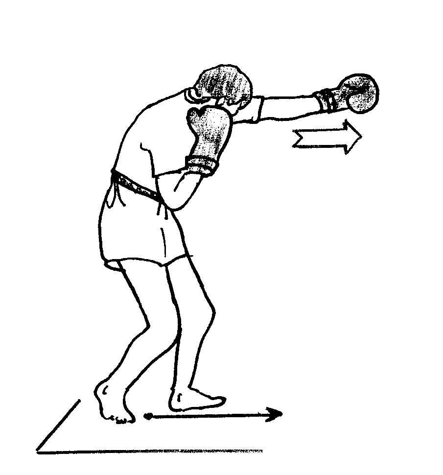 jab3.jpg